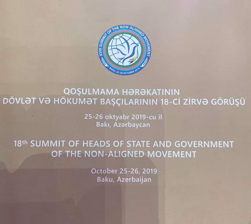 18. Gipfel der Bewegung der Blockfreien Staaten